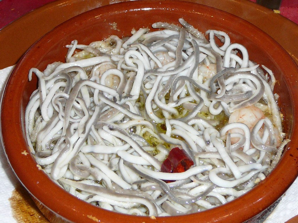 Unas gulas con gambas al ajillo.